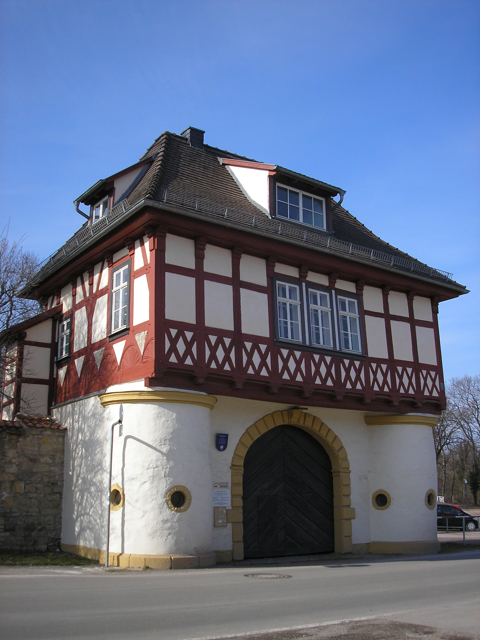 Das Fischtor in Arnstadt (Thüringen).